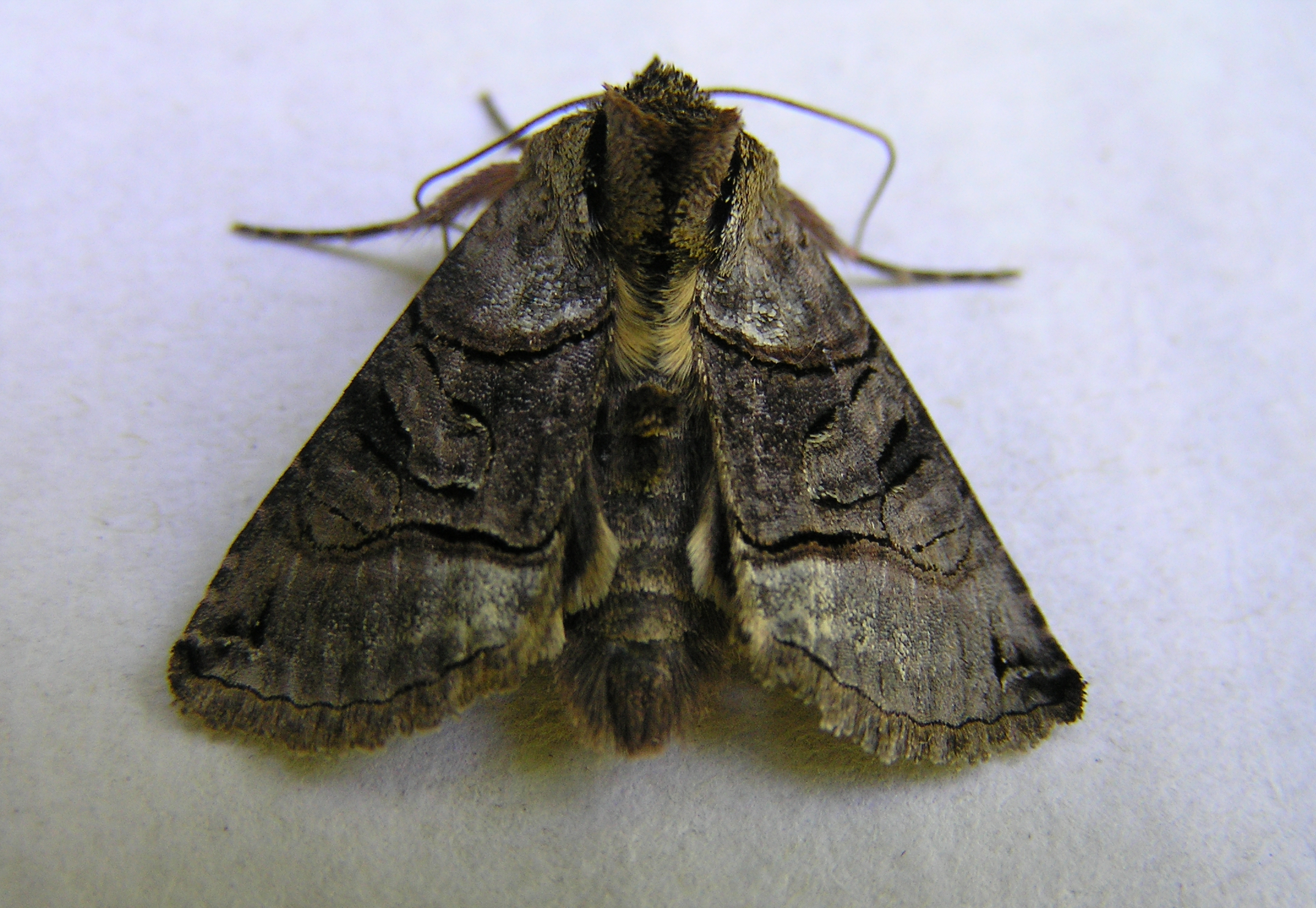 Abrostola tripartita